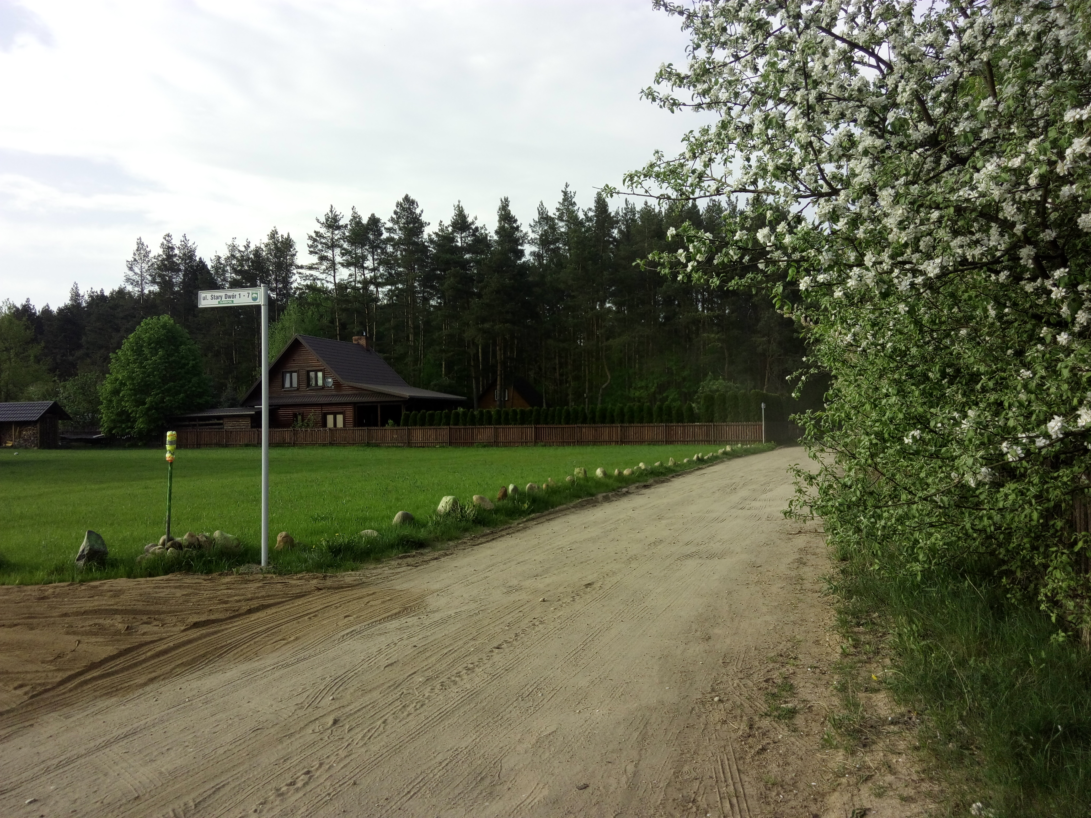 Stary Dwór, część wsi Tarnopol.